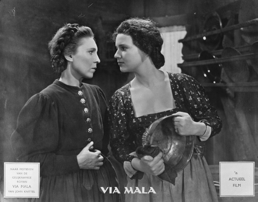 Actueel film repros Via Mala, Hilde Körber en Renate Mannhardt